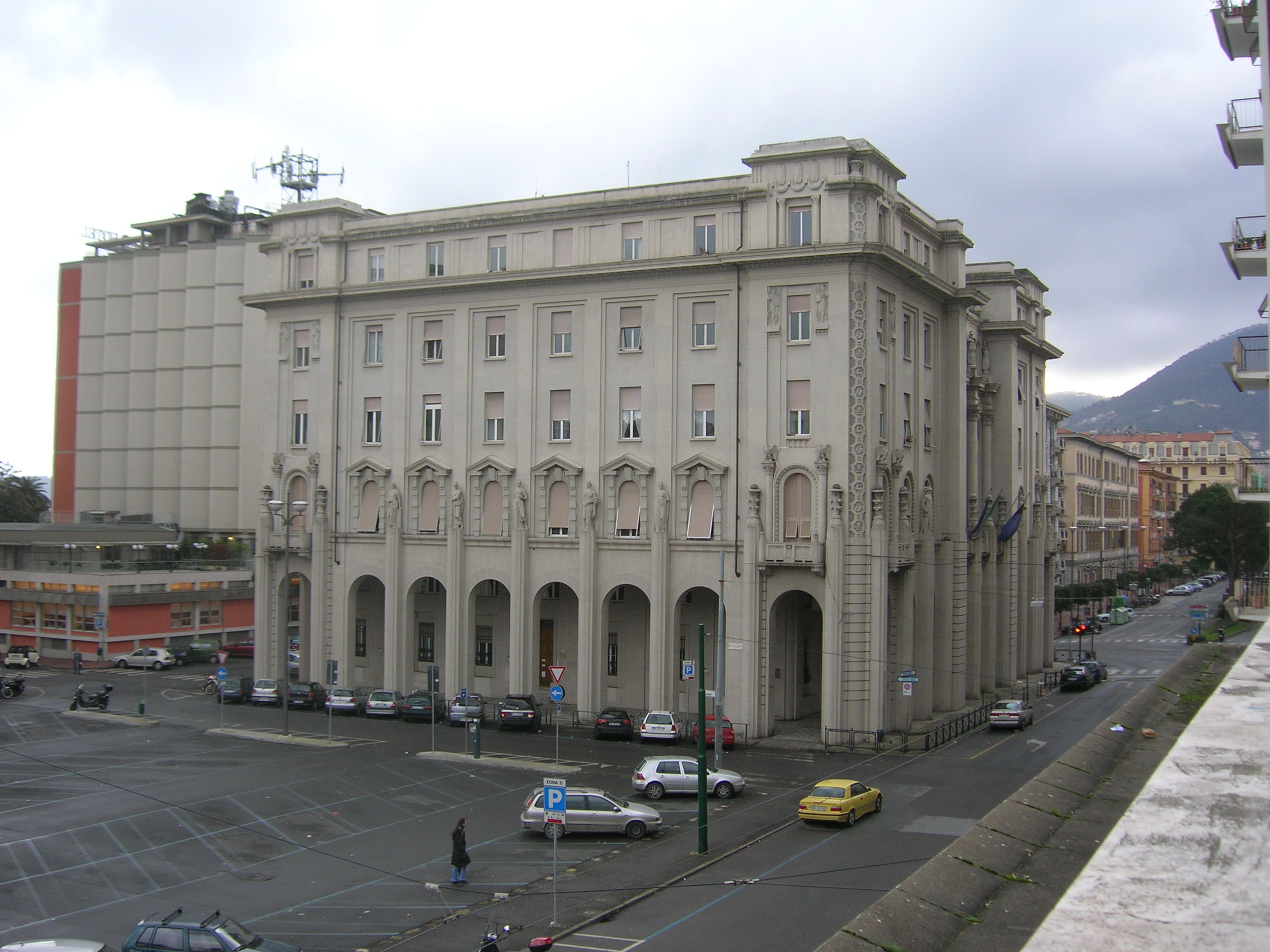 La Spezia - Palazzo della Provincia